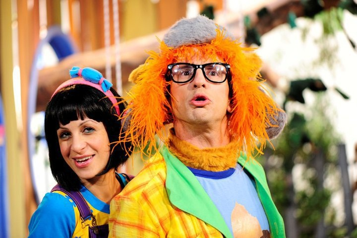 ההצגה רוני וקשיו